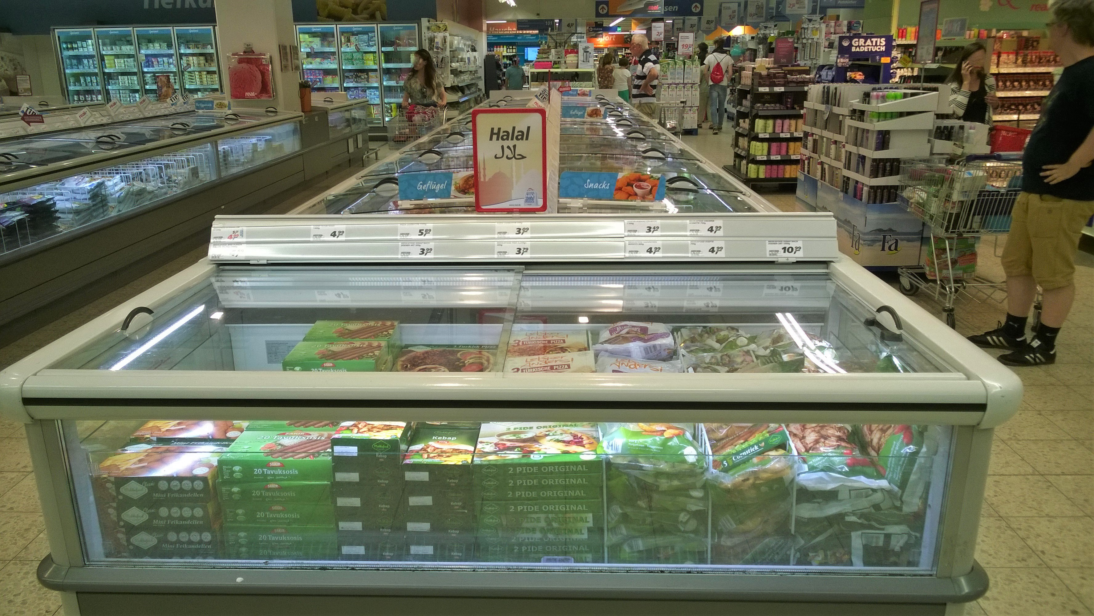 Eine Tiefkühlabteilung mit Lebensmittel die Halal sind.